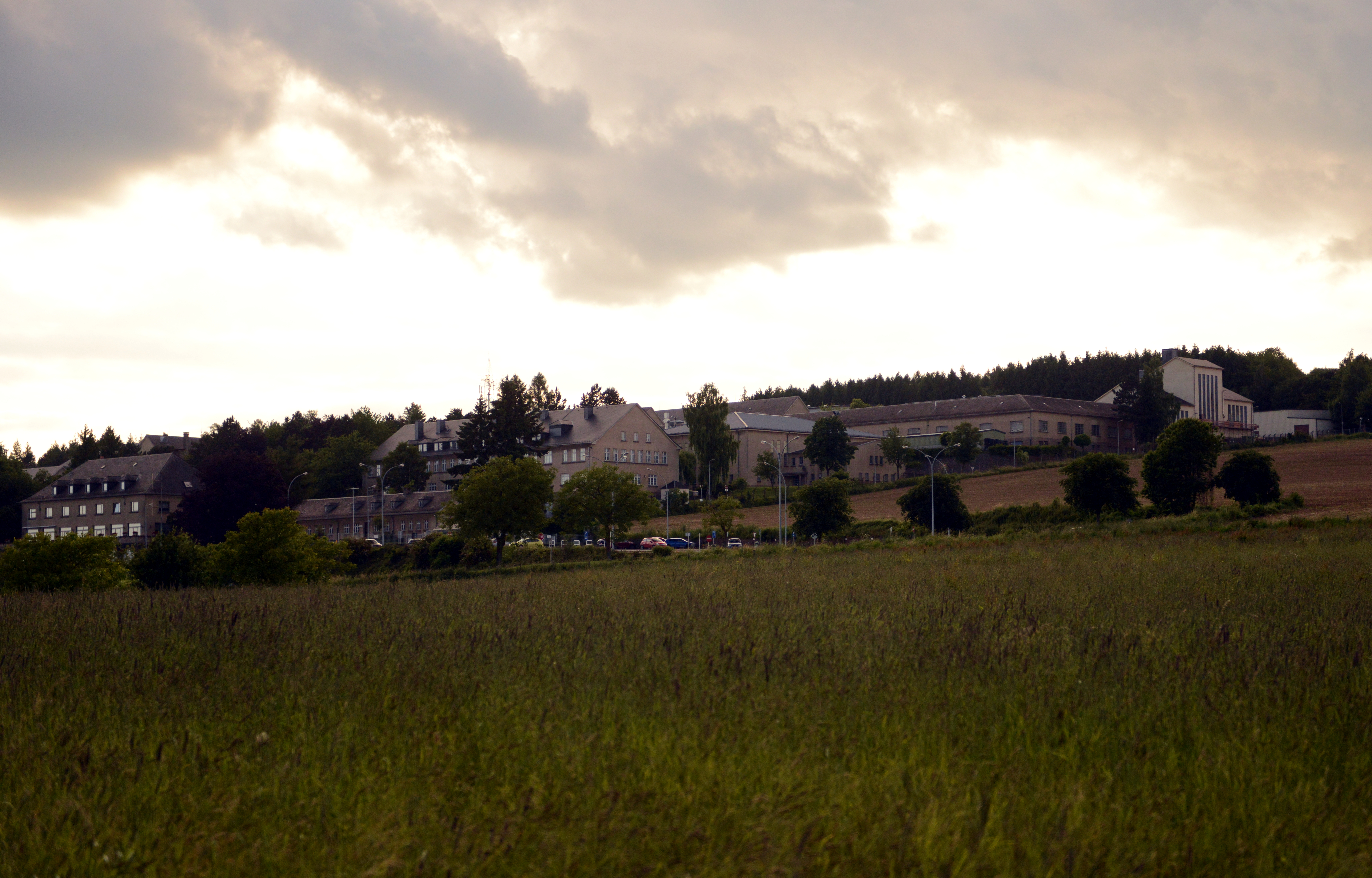 D'Kasär Grand-Duc Jean um Härebierg zu Dikrech.